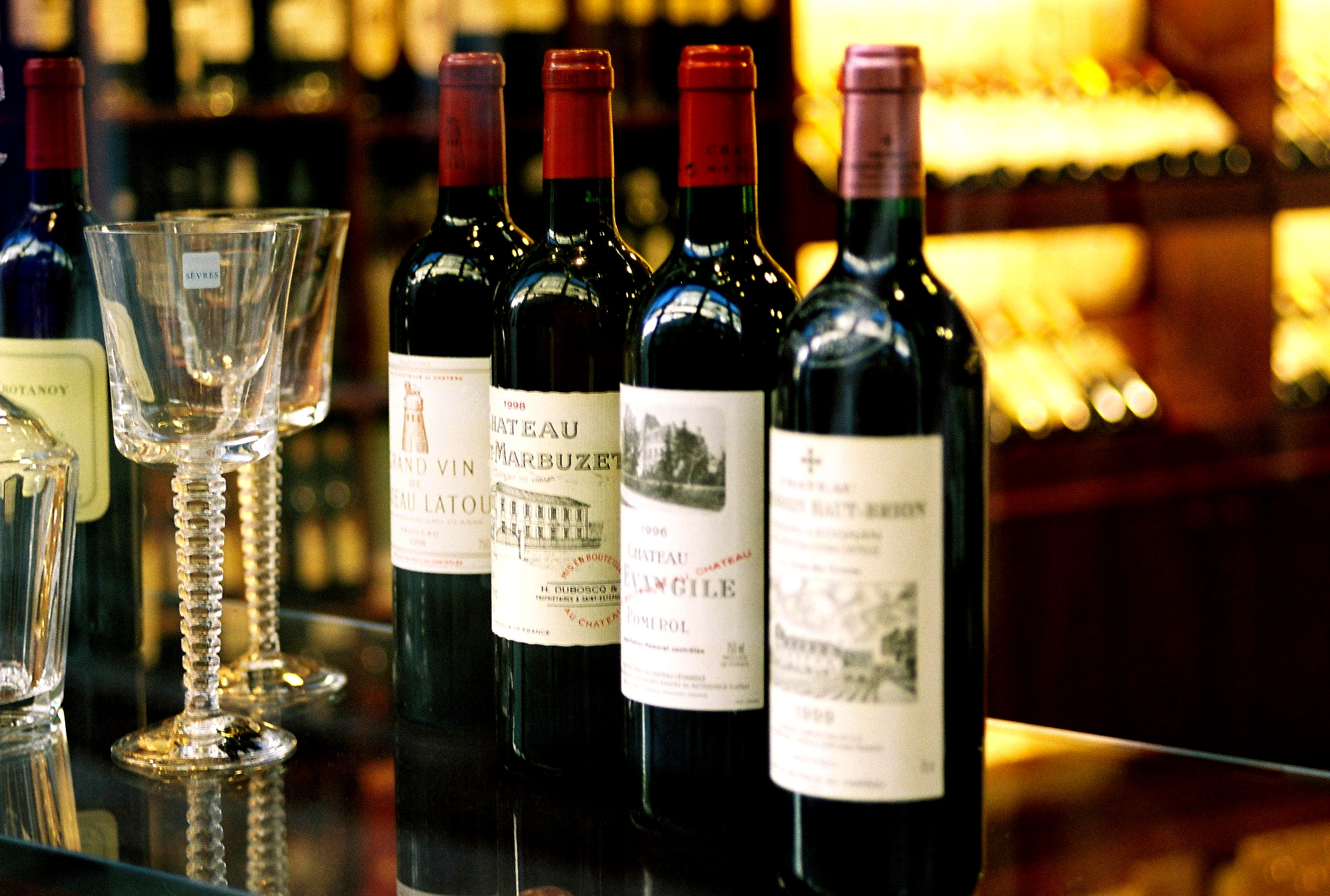 From the French producers Chateau Latour, Chateau Haut-Marbuzet, Chateau de l'Evangile, Chateau la Mission Haut-Brion